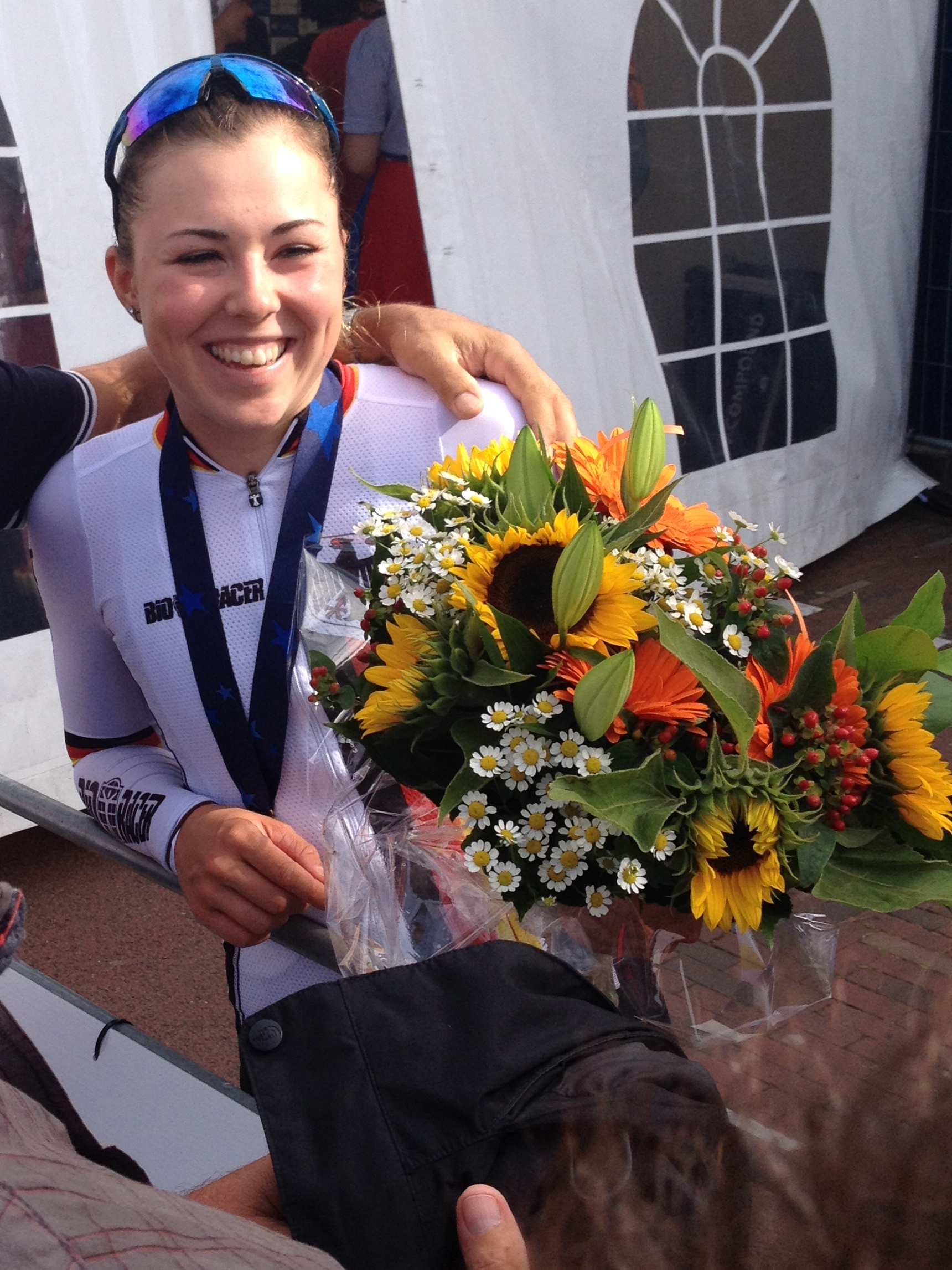 Wegwedstrijd voor vrouwen elite tijdens de Europese kampioenschappen wielrennen in Alkmaar op zaterdag 10 augustus 2019.